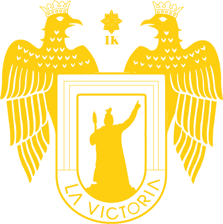 Escudo del distrito La Victoria en Lima